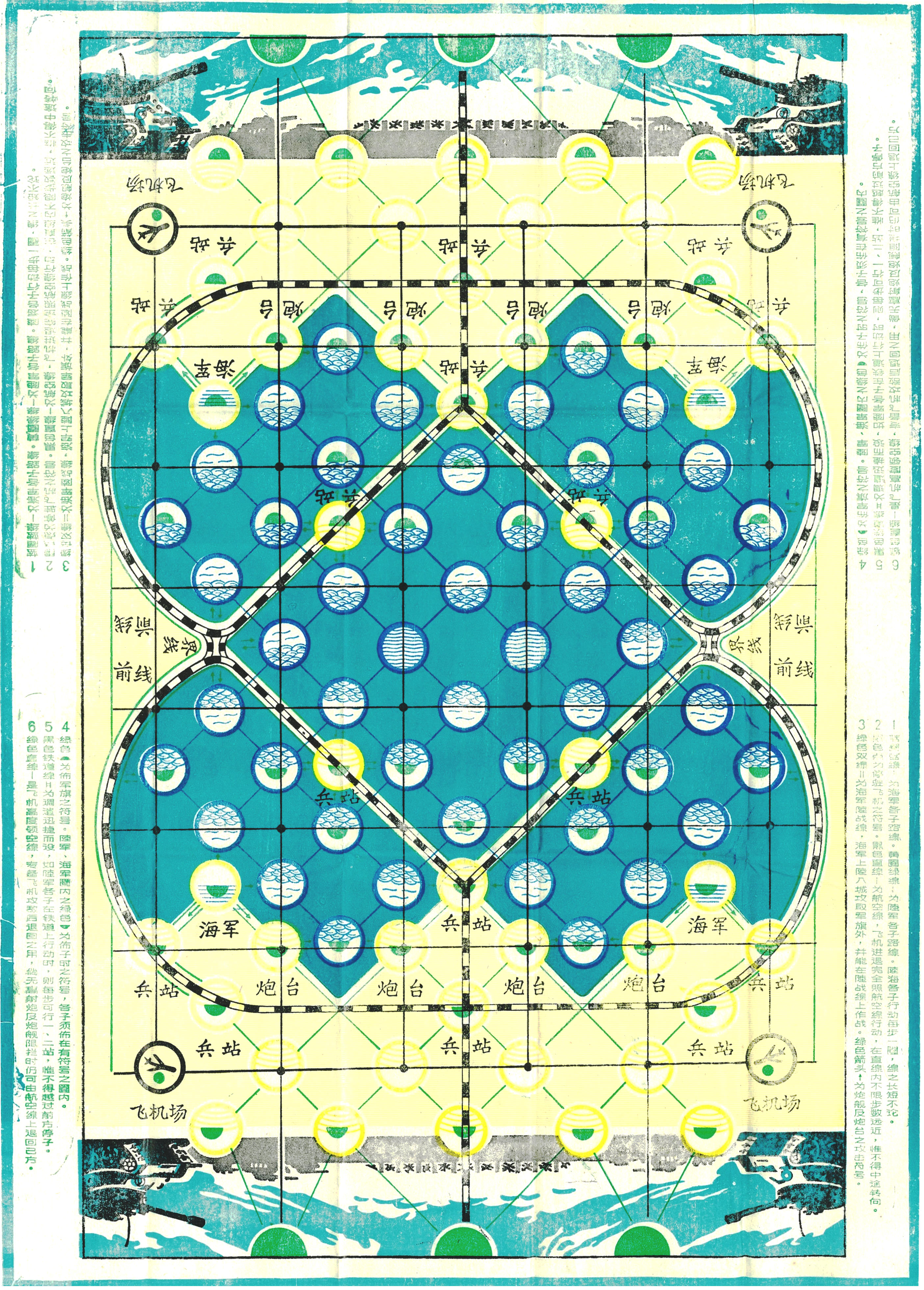 陸海空戰棋棋盤